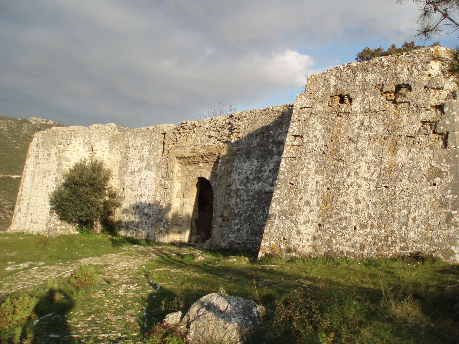 Κάστρο του Αλή Πασά